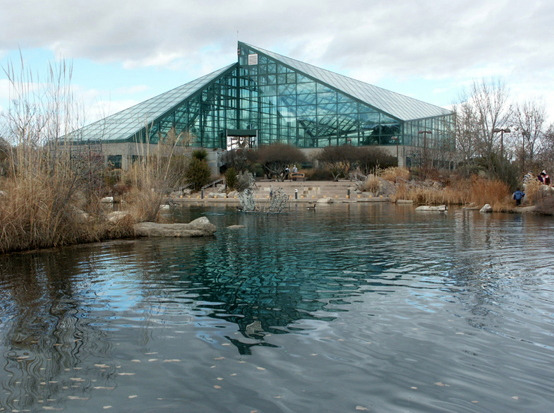 Albuquerque BioPark Botanical Garden, Albuquerque, New Mexico, USA.